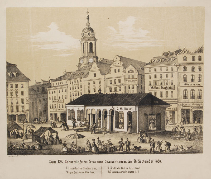 Zum 123. Geburtstage des Dresdener Chaisenhauses am 26. September 1868 (humoristische Darstellung)